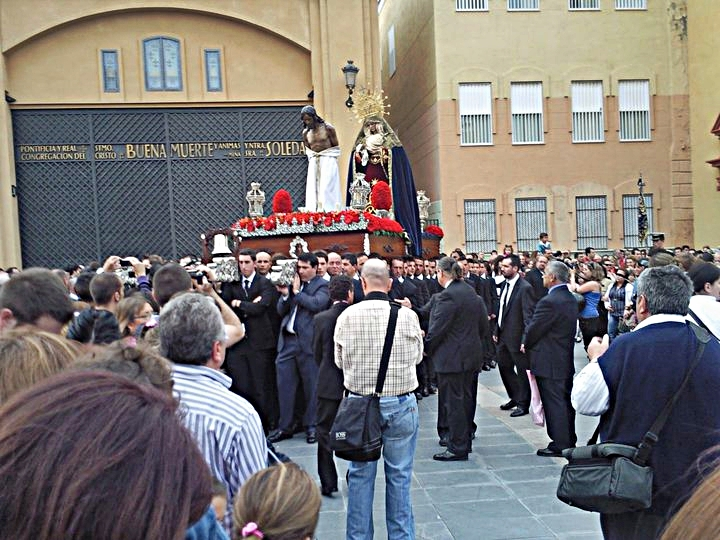 Trasladod e Humillación y Estrella por la Plaza de Santo Domingo, 2011